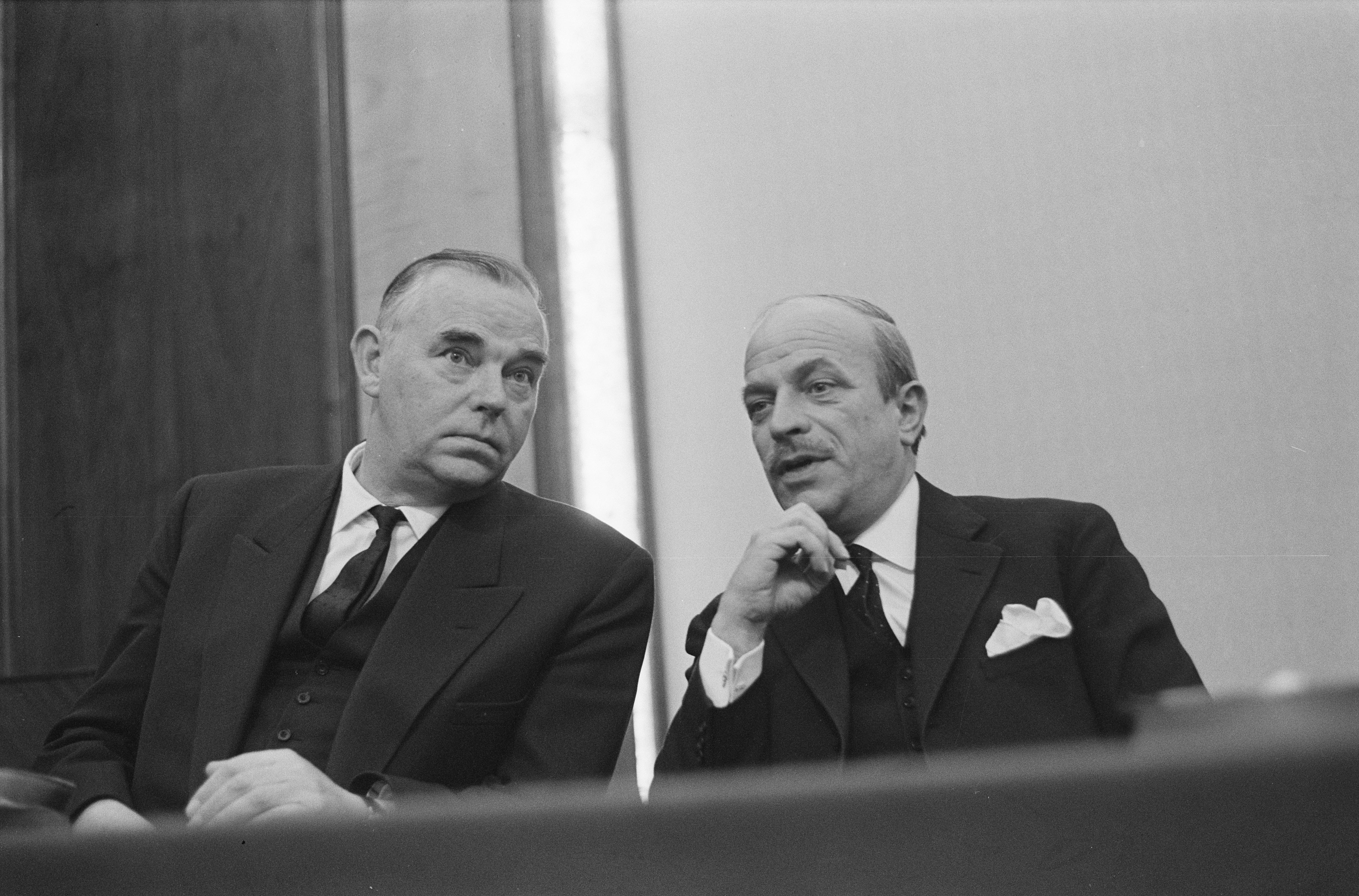 Collectie / Archief : Fotocollectie Anefo Reportage / Serie : [ onbekend ] Beschrijving : Debatavond Nieuw-Guinea in Krasnopolski. Mr. Burger en professor Duynstee Datum : 23 november 1961 Trefwoorden : debatten Persoonsnaam : Professor Duynstee Fotograaf : Rossem, Wim van / Anefo Auteursrechthebbende : Nationaal Archief Materiaalsoort : Negatief (zwart/wit) Nummer archiefinventaris : bekijk toegang 2.24.01.05 Bestanddeelnummer : 913-2269